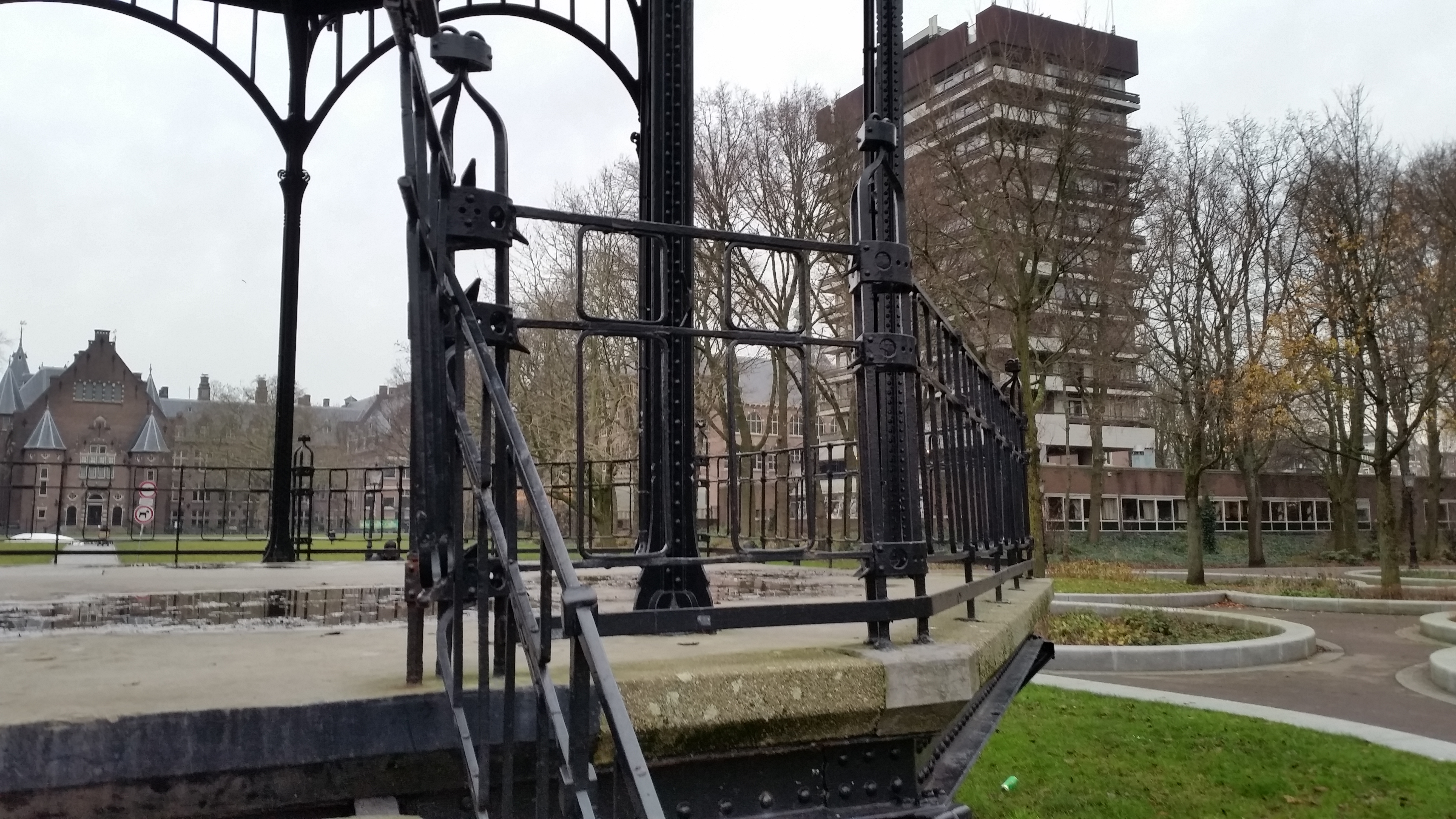 Gemeentelijk Monument 200643: Muziekkoepel Oosterpark; in het Oosterpark; Amsterdam-oost (december 2019)